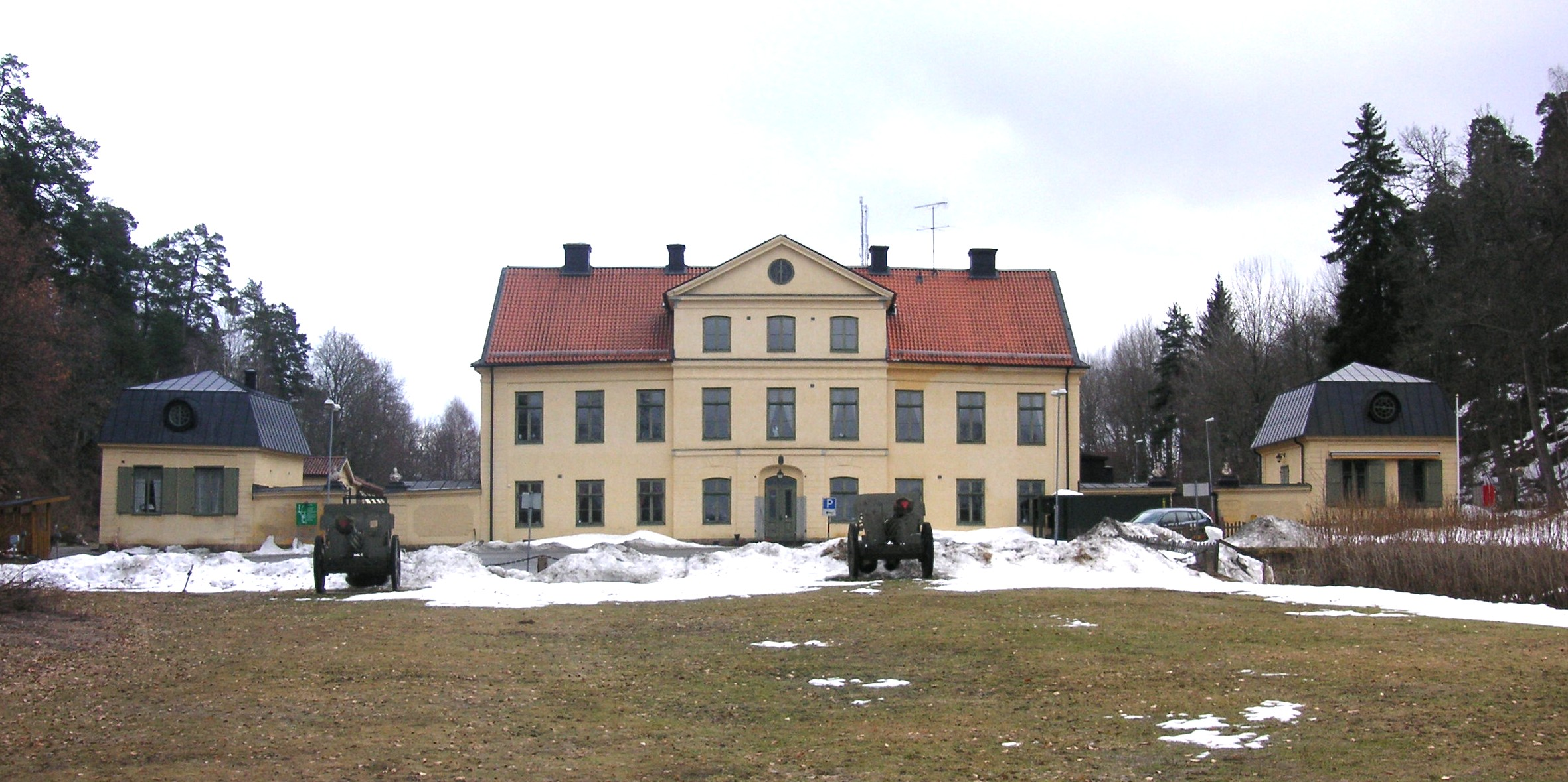 Vällinge gård (Hemvärnets stridsskola) i Salem